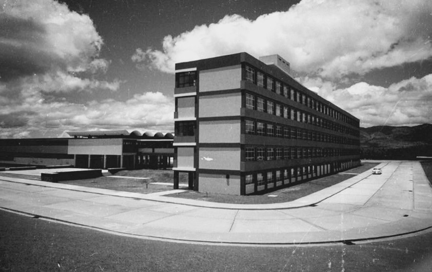 Facultad de Ingeniería de la USAC el día de su inauguración.